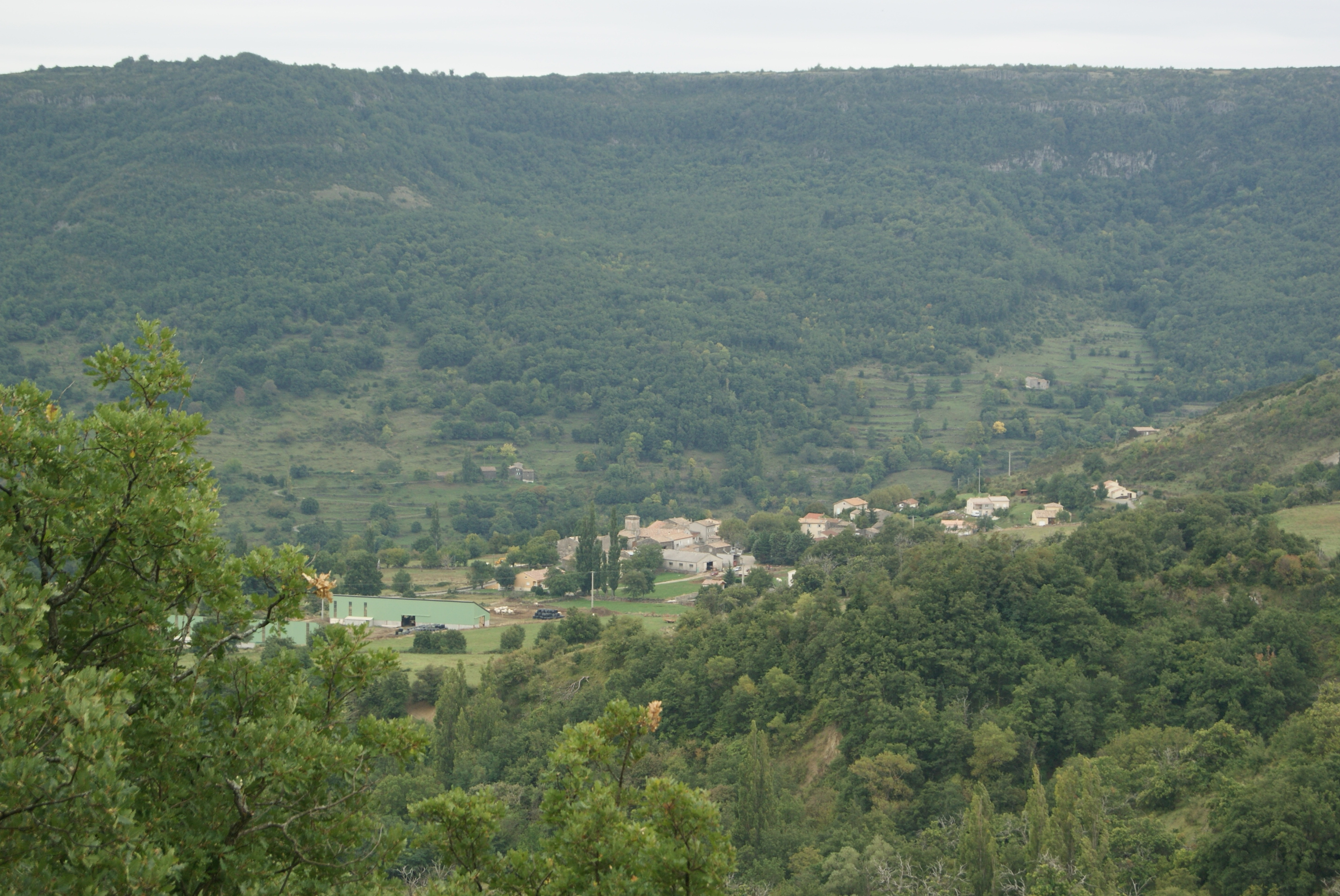 Vue depuis le versant Sud